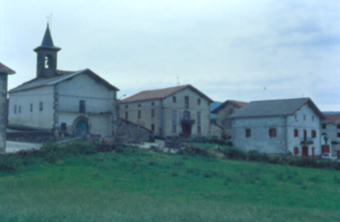 viscarret, a village next to espinal